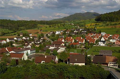 Schulanlage und neuere Wohnsiedlung in Diegten